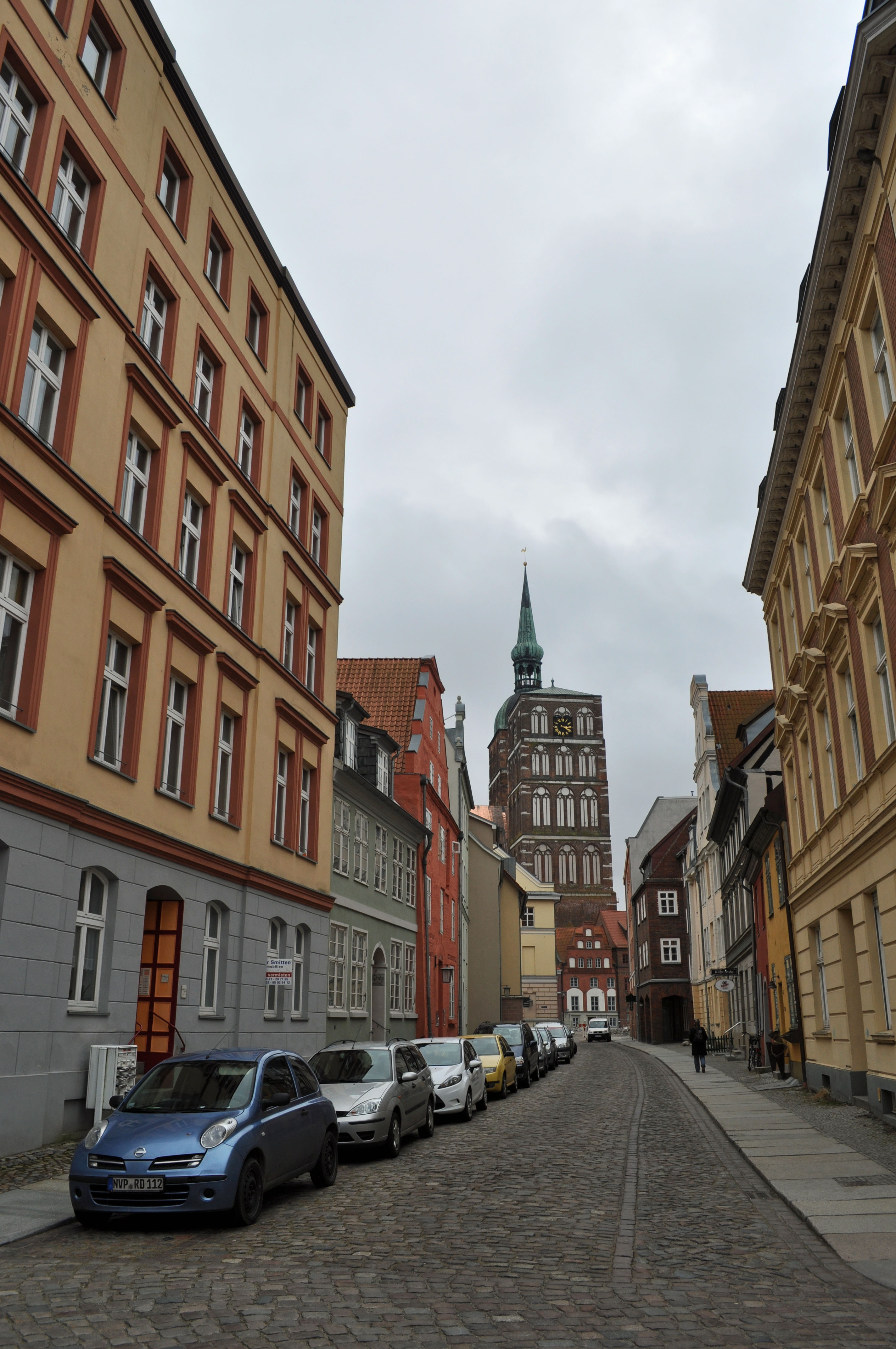 Gebäude bzw. Gebäudedetail in Stralsund. Straße und Hausnummer siehe Dateiname.